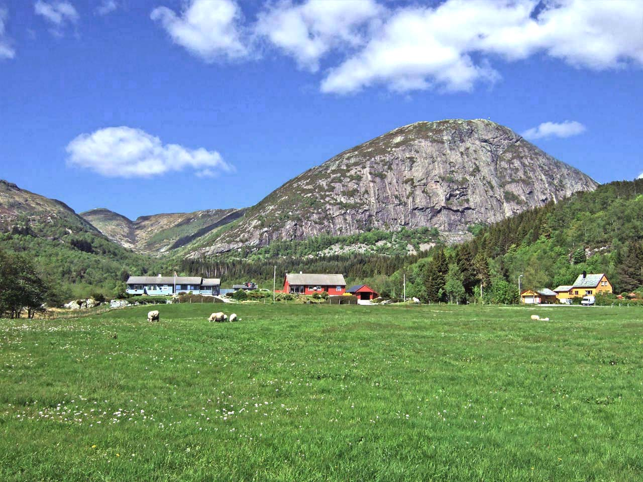 Fristadfjellet med Askdalen til venstre